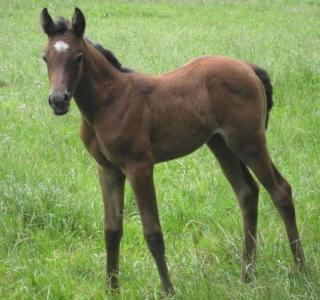 Potra afectada. Nota la posición de las extremidades. Potra afectada con Abiotrofia Cerebelosa